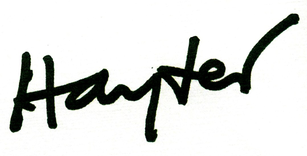 Signature du peintre Stanley William Hayter. Scan d'après couverture de catalogue. This signature is believed to be ineligible for copyright and therefore in the public domain because it falls below the required level of originality for copyright protection both in the United States and in the source country (if different). In this case, the source country (e.g. the country of nationality of the signatory) is believed to be France. Cette image ou le texte qui y est représenté est seulement composé de formes géométriques simples et de texte. Elle n’atteint pas le seuil d'originalité nécessaire pour la protection du droit d’auteur, et est donc du domaine public. See autographs of Magritte and Picasso